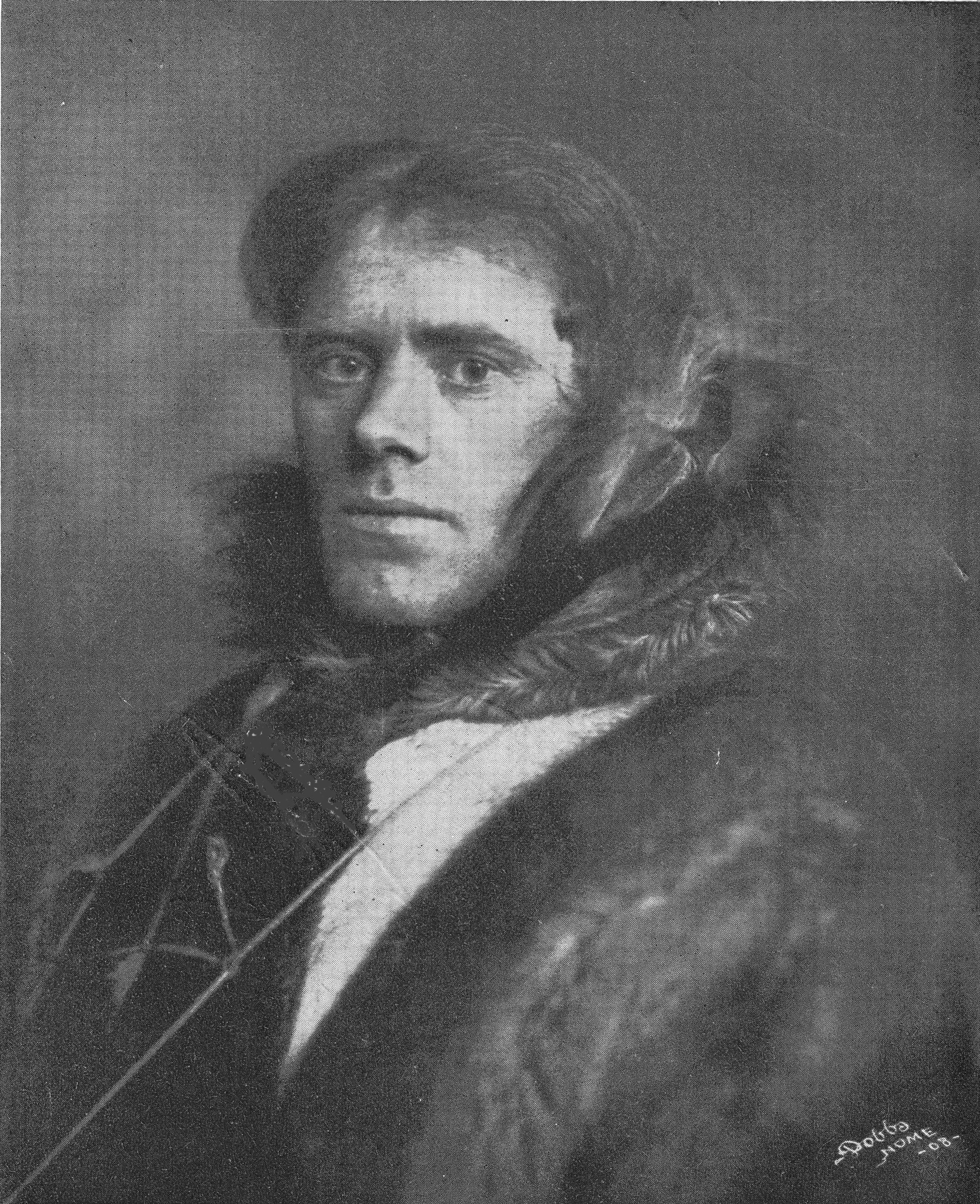 Ejnar Mikkelsen. Fotografie von Beverly Bennett Dobbs, wahrscheinlich 1906, sicher vor 1913.